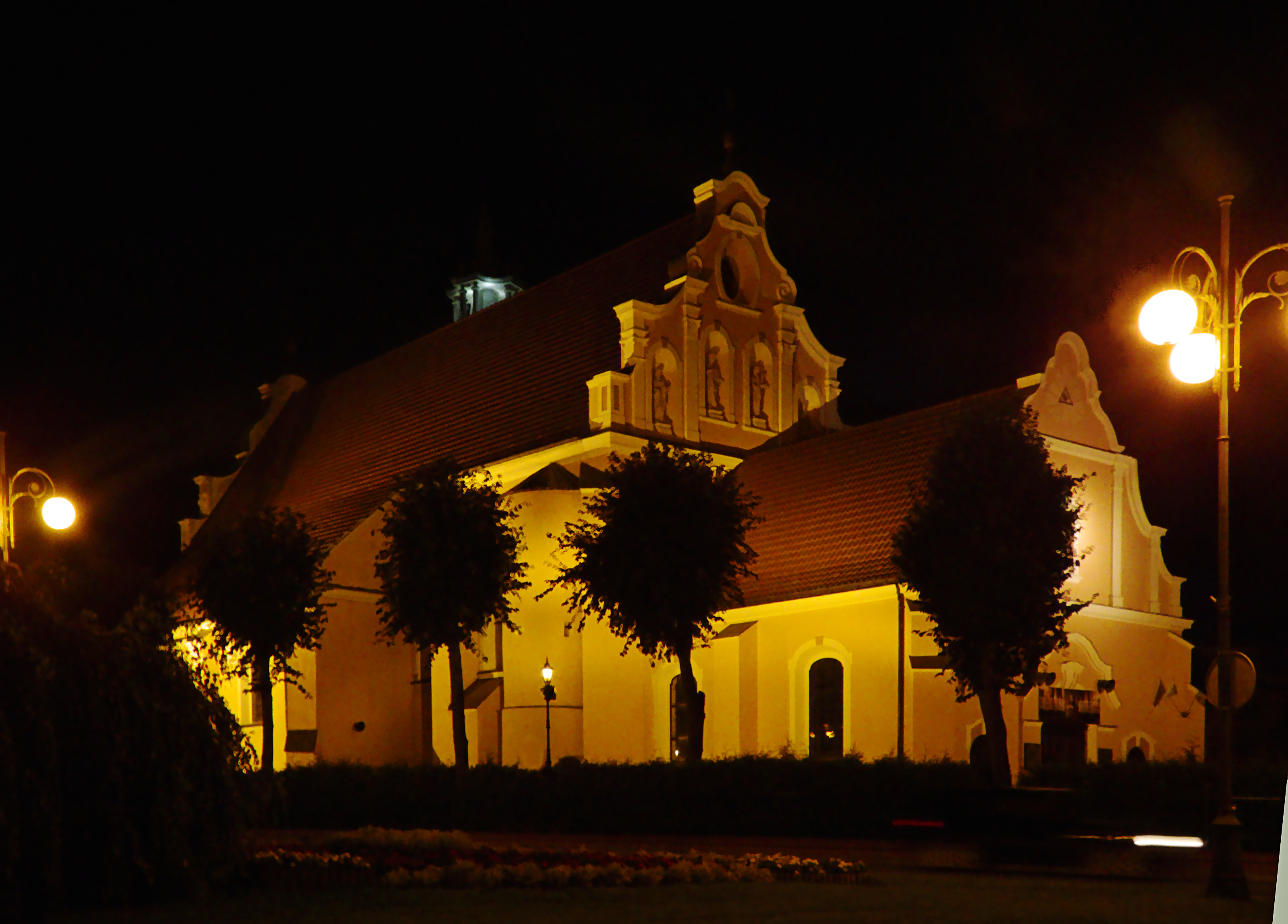 Chodzież, kościół par. p.w. św. Floriana